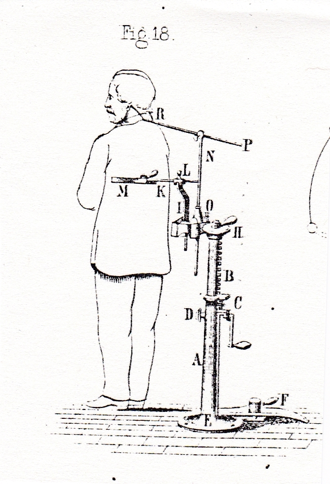 Kopfstütze eines Fotoateliers um 1869. Aus: Otto Bühler, Atelier und Apparat des Photographen, Weimar 1869, Tafel V, fig. 18.